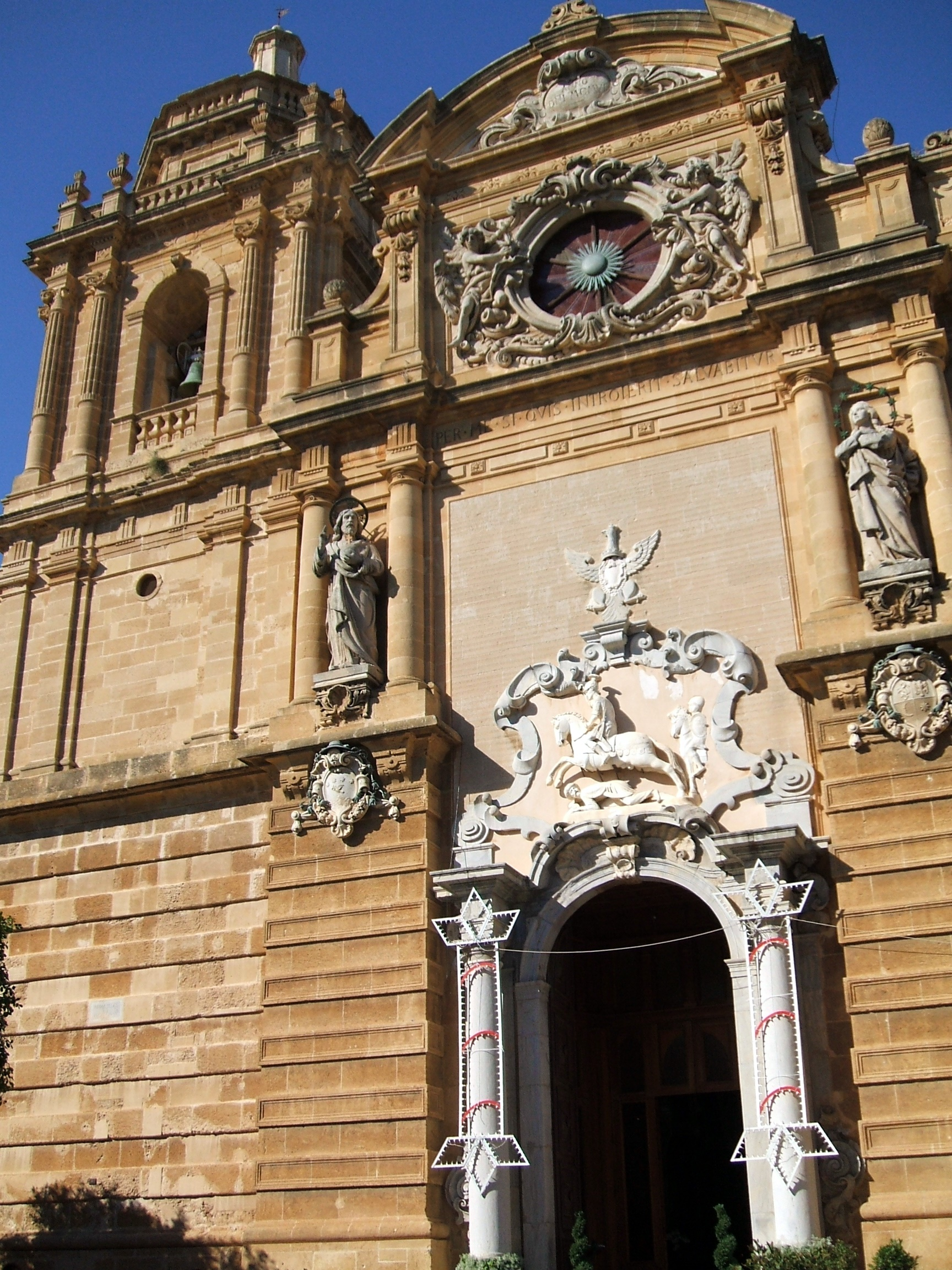 Cattedrale di Mazara